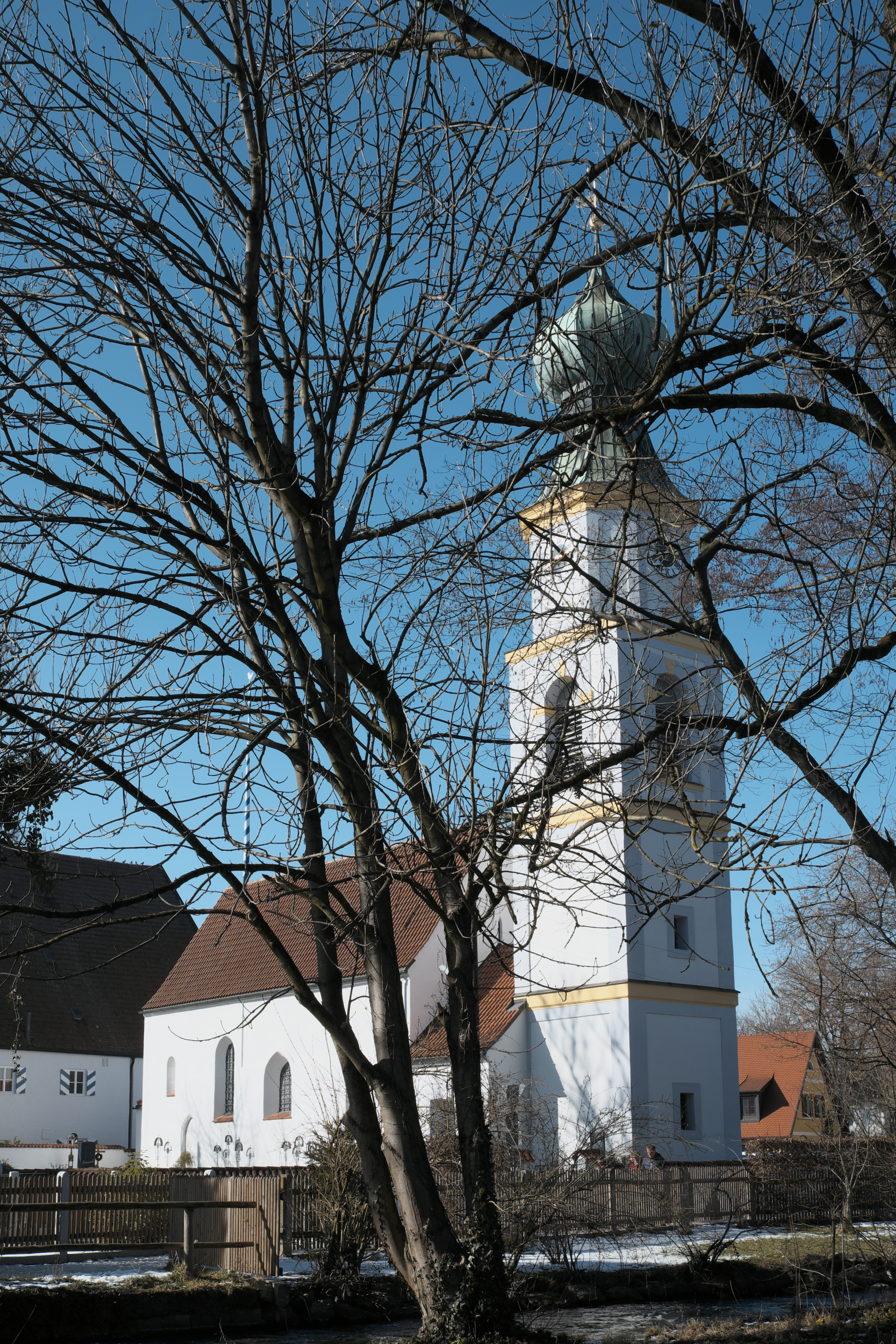 Alte katholische Pfarrkirche St. Georg in Obermenzing im Stadtbezirk Pasing-Obermenzing in München (Bayern/Deutschland)